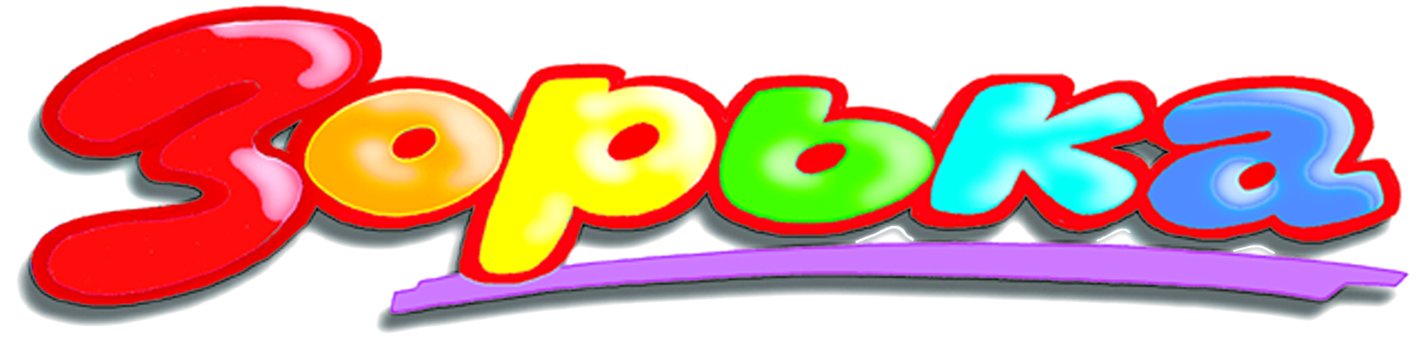 Логотип